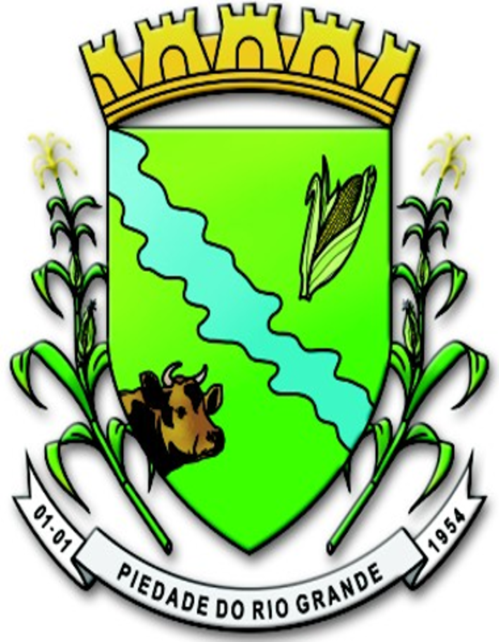 Brasão do Município